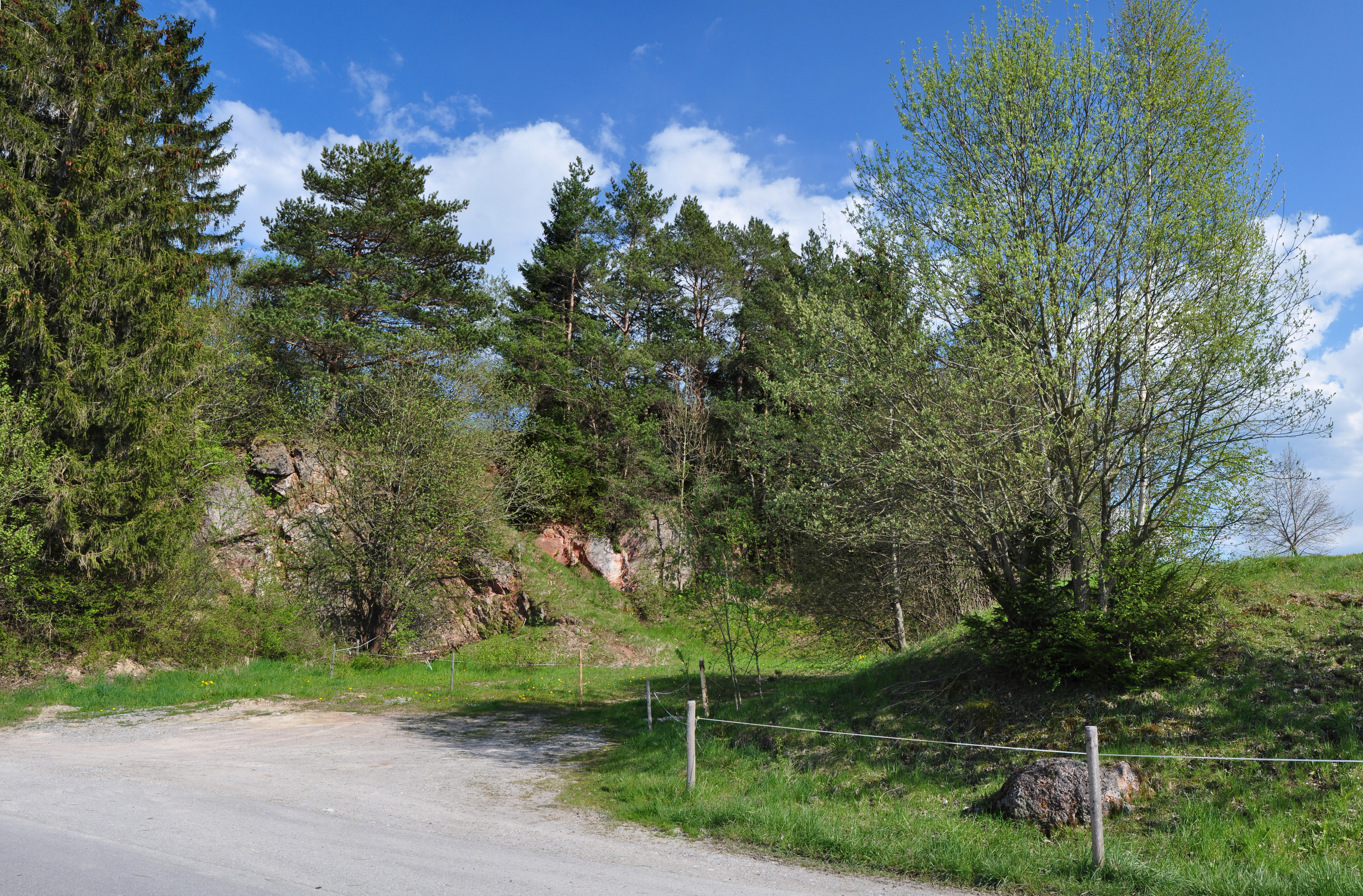 Der ehemalige Steinbruch bei Seeg. Geotop 777A009